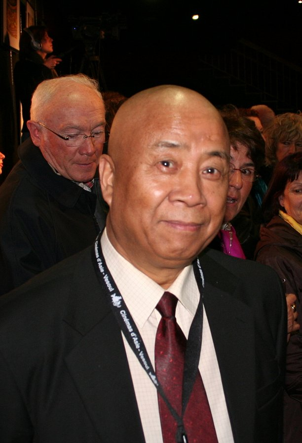 Wu Tianming in Festival international des cinémas d'Asie de Vesoul